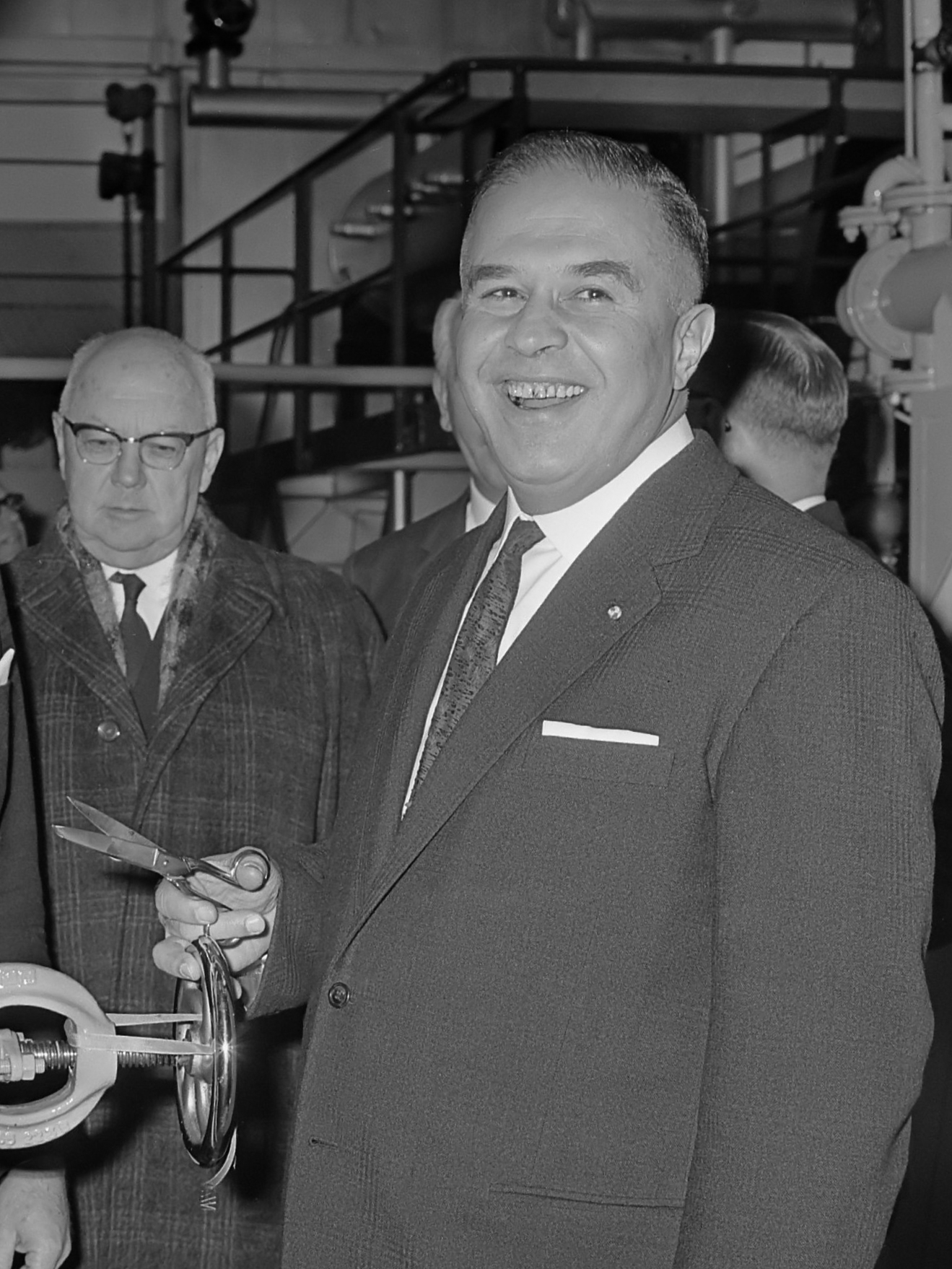 Gas voor Rijswijk, burgemeester drs. A. Th. Bogaardt (r) draait afsluiter open 23 november 1964